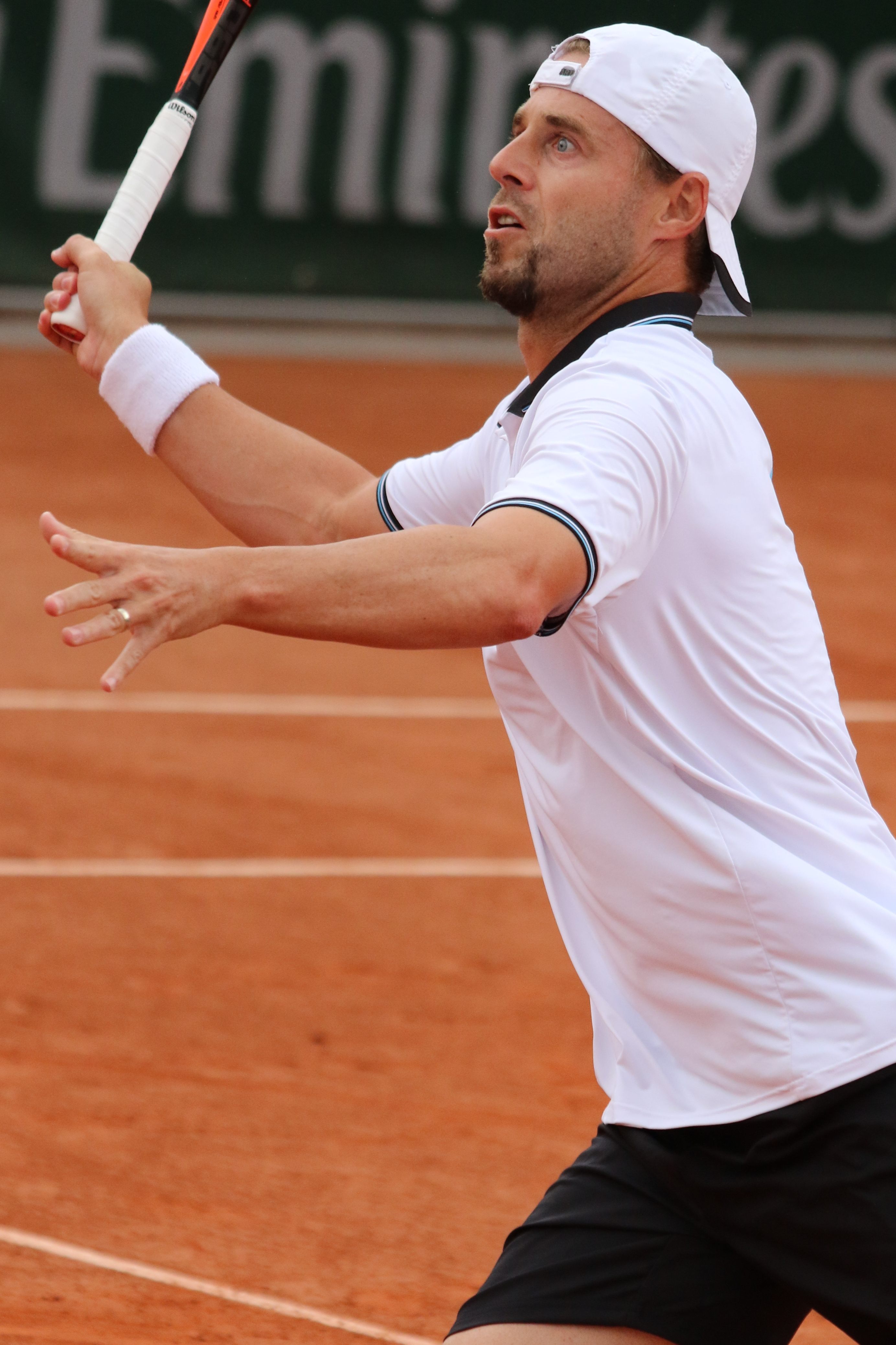 Marach RG18 (39)